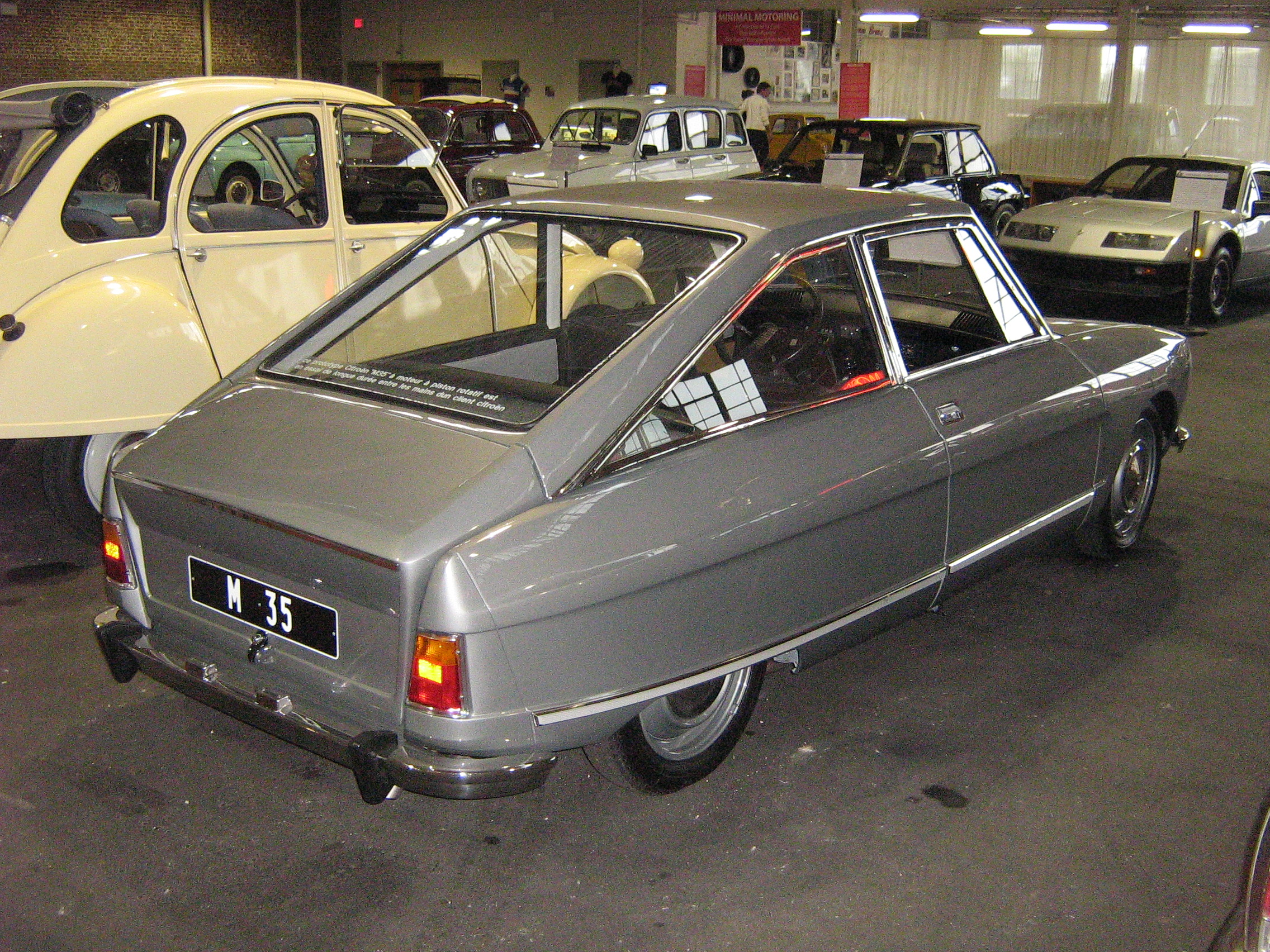 1970 Citroen M35